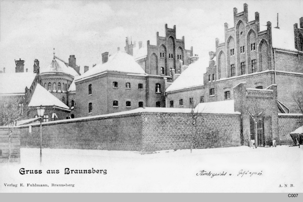 Braunsberg, Ostpreußen: Stadtmauer, Amtsgericht und Gefängnis.